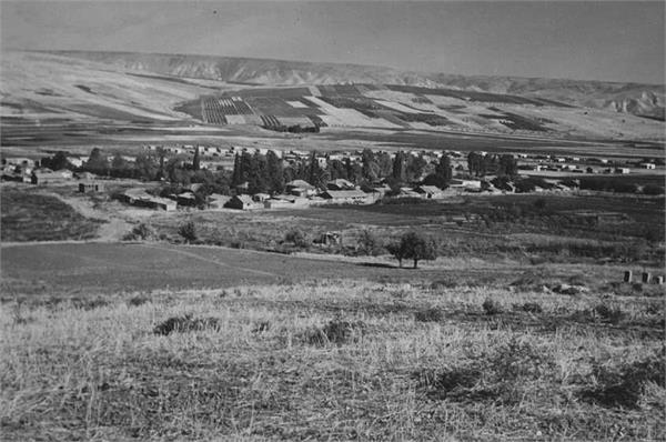 יבניאל ובית וגן - מראה